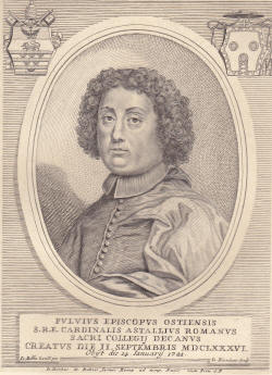 Cardinale Fulvio Astalli